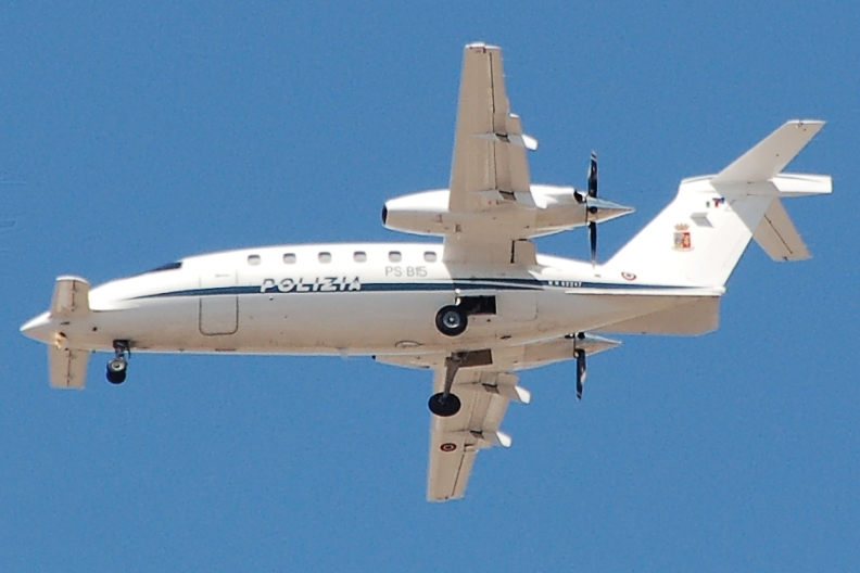 Piaggio P 180 Avanti